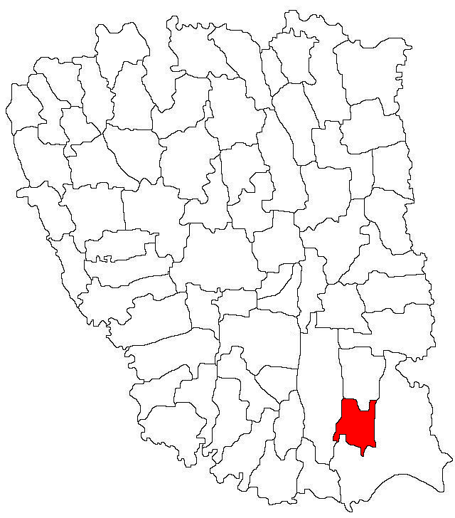 Categorie:Hărţi ale judeţului Galaţi